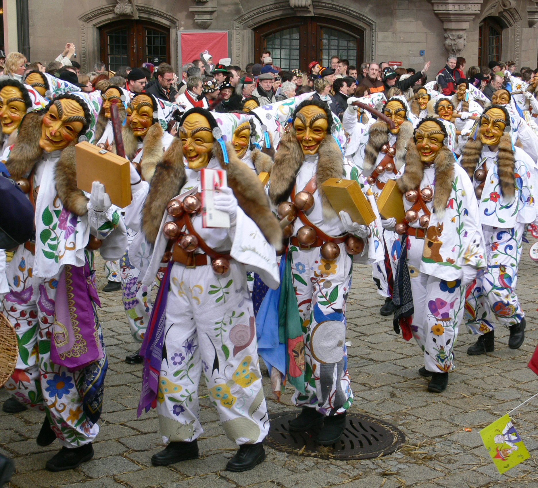 Narrenzunft Bad Waldsee, Figur: Faselhannes Veranstaltung: Narrensprung beim Narrentreffen Meßkirch 2006